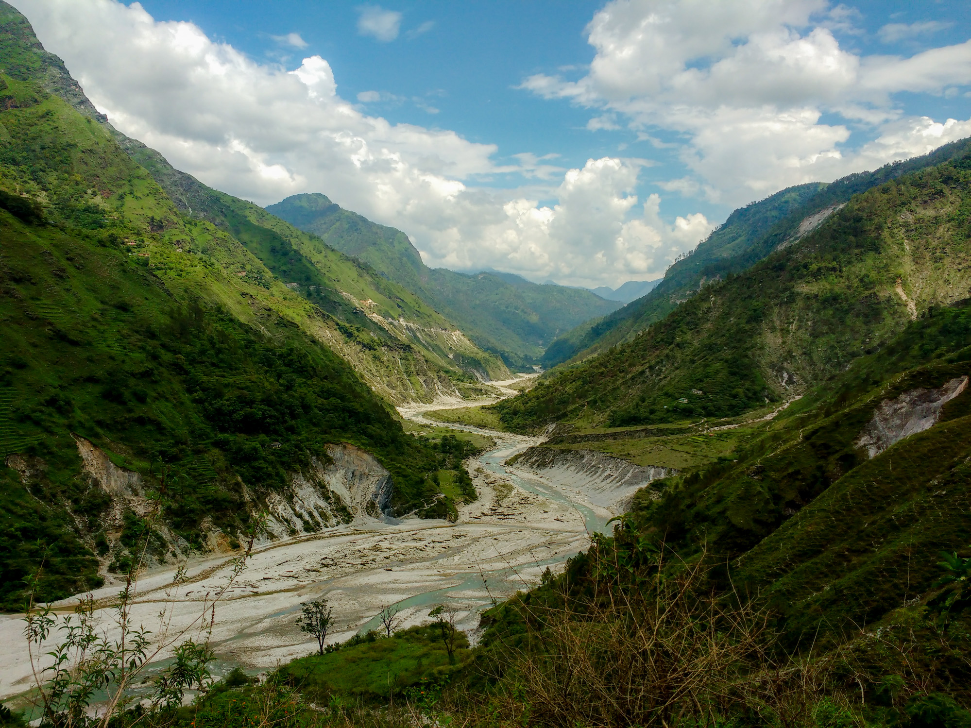 IMG_20160617_132452119